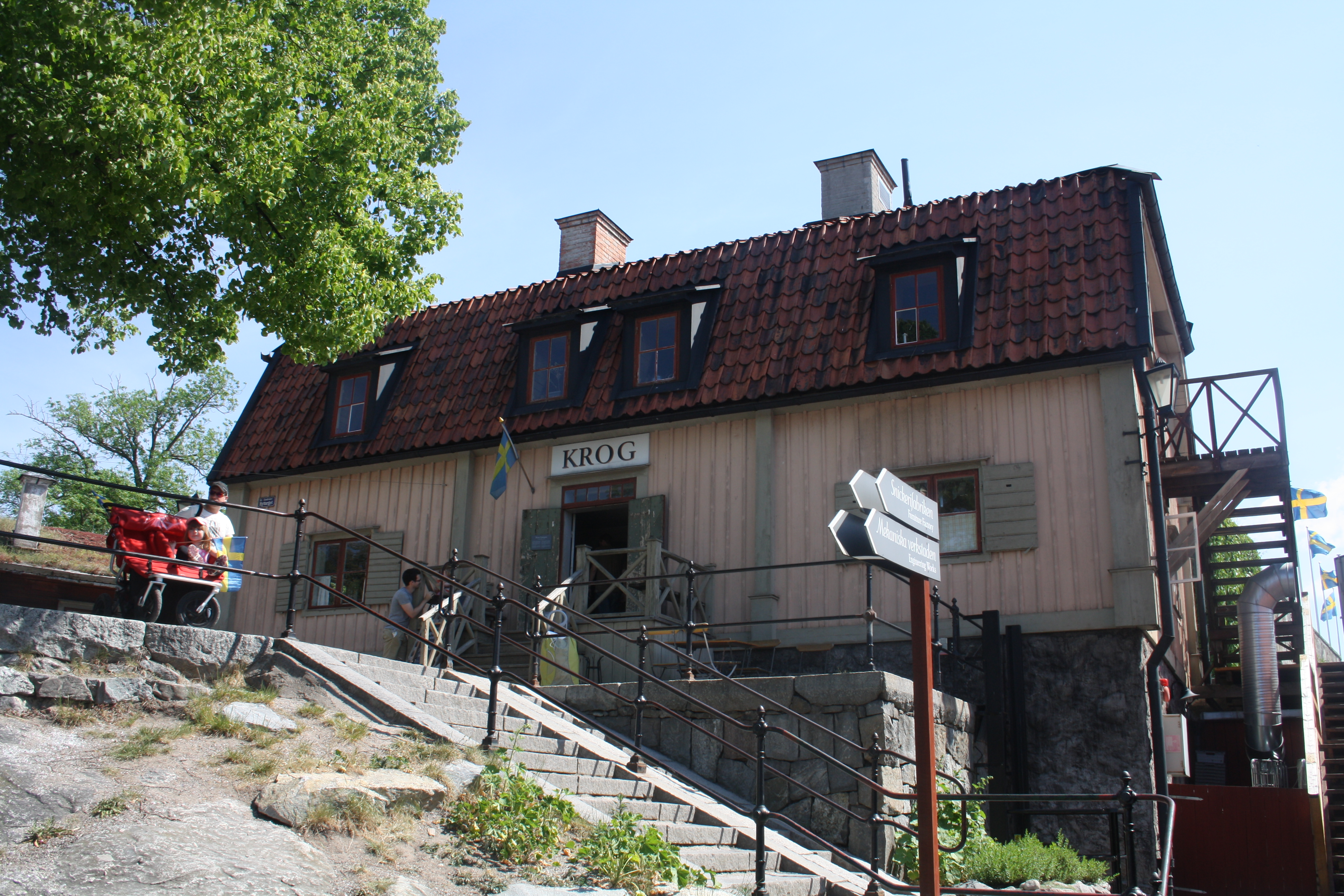 Stora Gungan, Skansen in Stockholm, Sweden at National Day of Sweden.